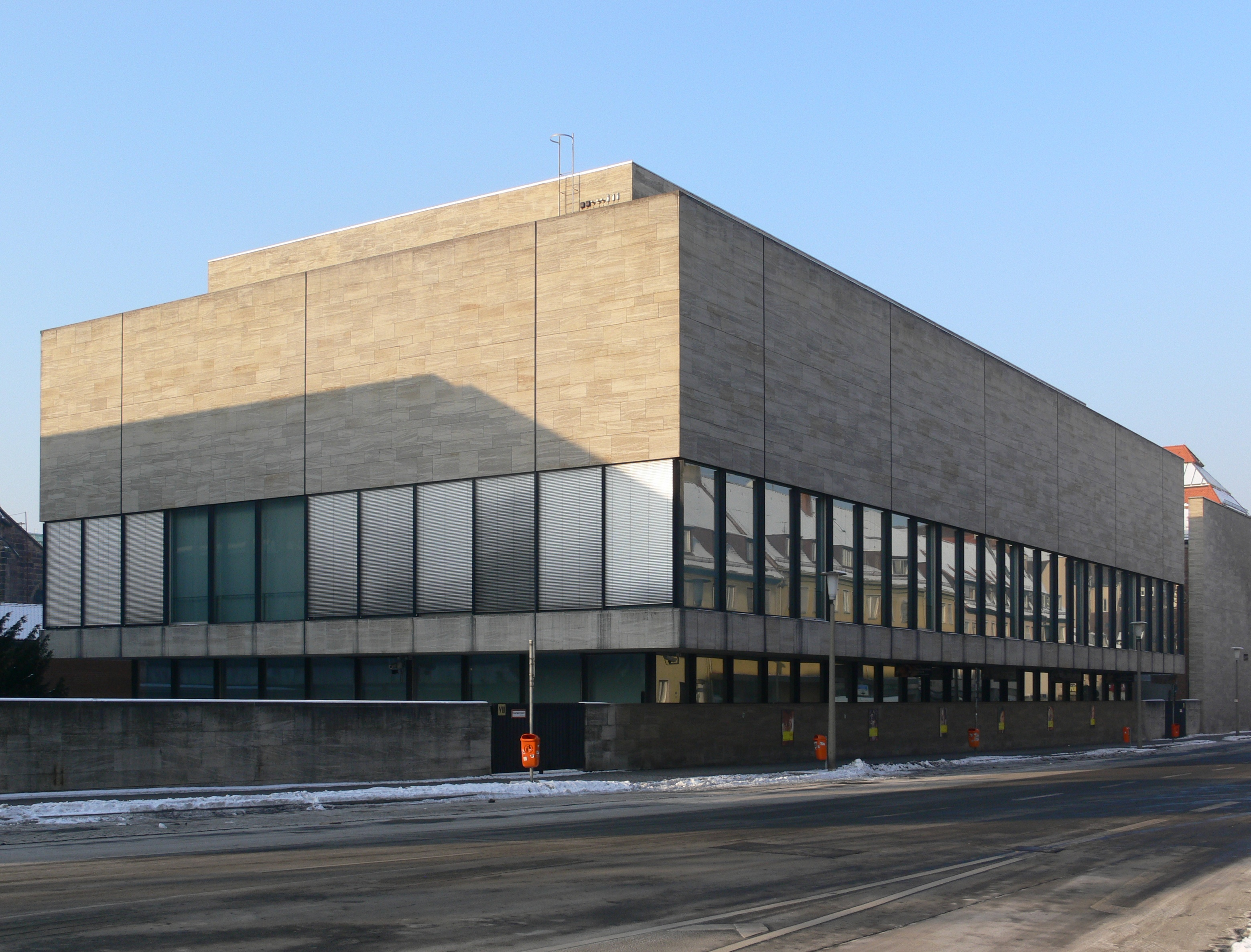 Germanisches Nationalmuseum, Nürnberg Ostbau, Grasersgasse, erbaut 1968-1971 von Sep Ruf